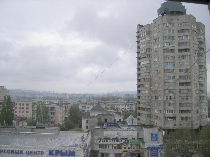 20 этажный дом в симферополе